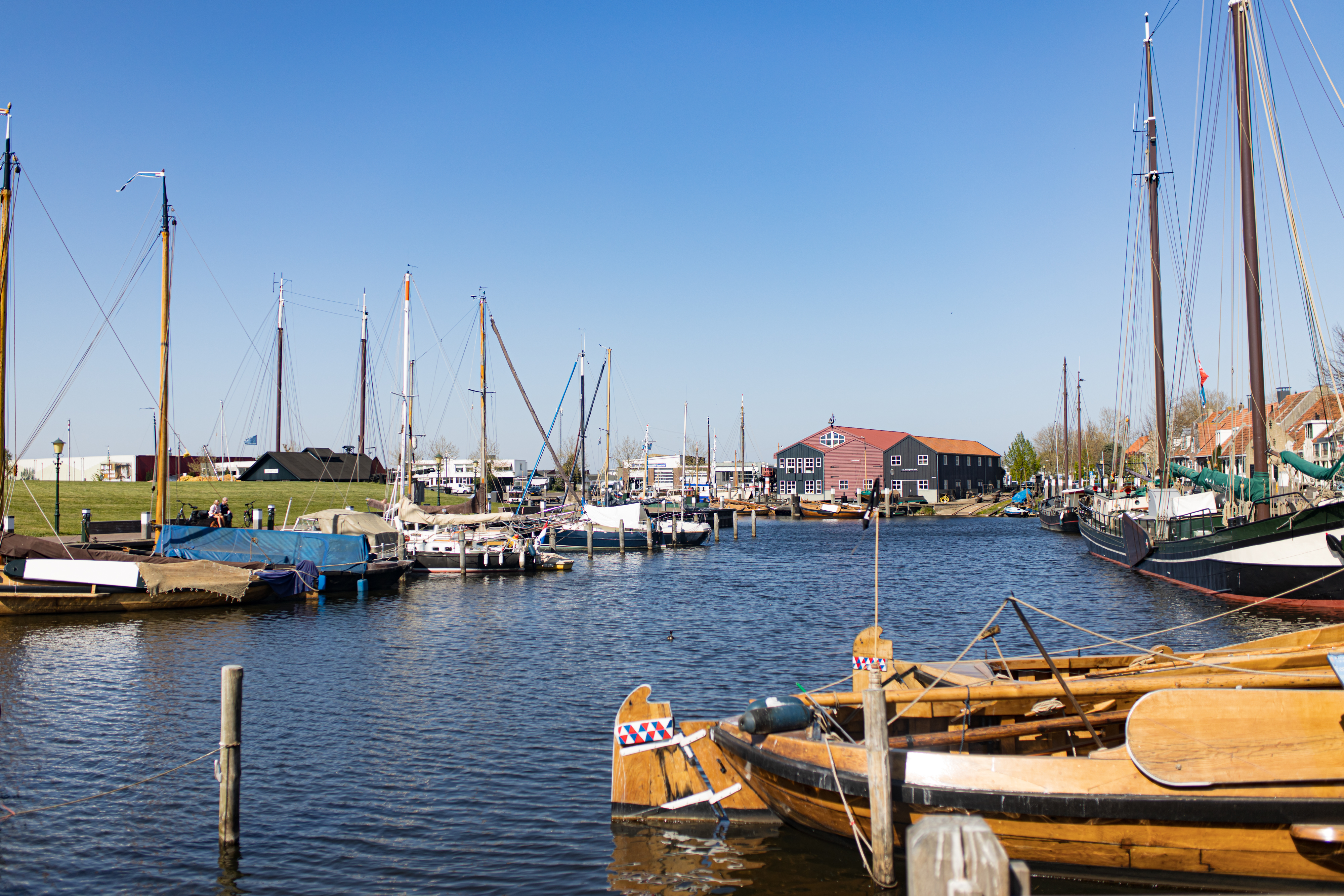 Haven in Elburg in 2020